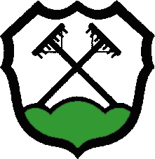 Wappen Wietzendorfs